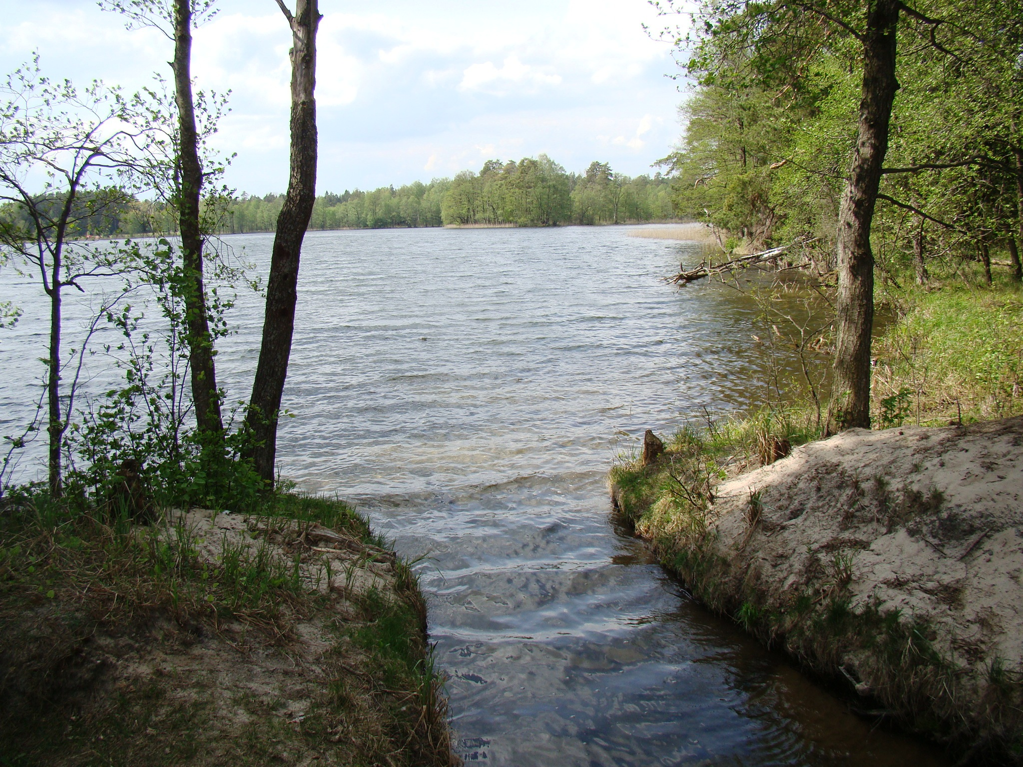 Przekop na Jezioro Kalejty